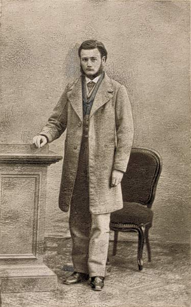 Photographie de Zola à 22 ans